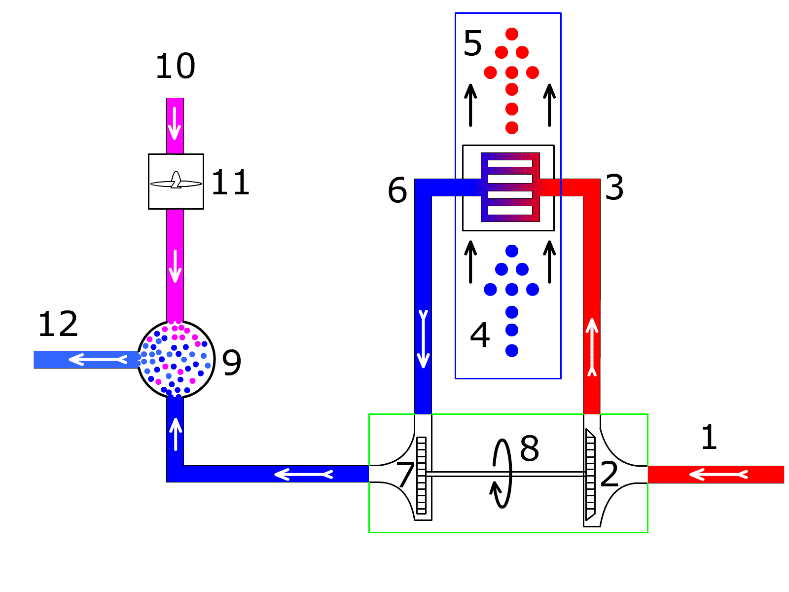 Air-Cycle-Maschine - Bestandteil einer Klimaanlge im Flugzeug und in anderen Kühlgeräten Air Cycle Machine - ACM - der Kern der Packs: (1): heiße Hochdruck-Zapfluft von den Triebwerken; (2): Kompressor der Air-Cycle-Machine (ACM) - komprimiert und erhitzt die heiße Luft weiter; (3): Eintritt der heißen, komprimierten Luft in den Wärmetauscher - Abkühlung durch kalte Außenluft; (4): kalte Strömungsluft (ram air); (5): durch den Wärmeaustausch erwärmte Luft; (6): Austritt der abgekühlten Luft (immer noch unter hohem Druck) aus dem Wärmetauscher; (7): Druckminderung (Entspannung) der Luft in der Turbine - diese turbine treibt den Kompressor an; (8) Air-Cycle-Maschine (Kompressor triebt über eine Achse die turbine an - Energieinput durch die eintretende druckluft); (9): Mischkammer (mixing box); (10): Rezirkulationsluft aus der Kabine (recirculated cabin air); (11): recirculation fan - Ventilator zur Aufrechterhaltung der Luftzirkulation zwischen Kabine und Klimaanlage;(12): kühle Luft für die Kabine